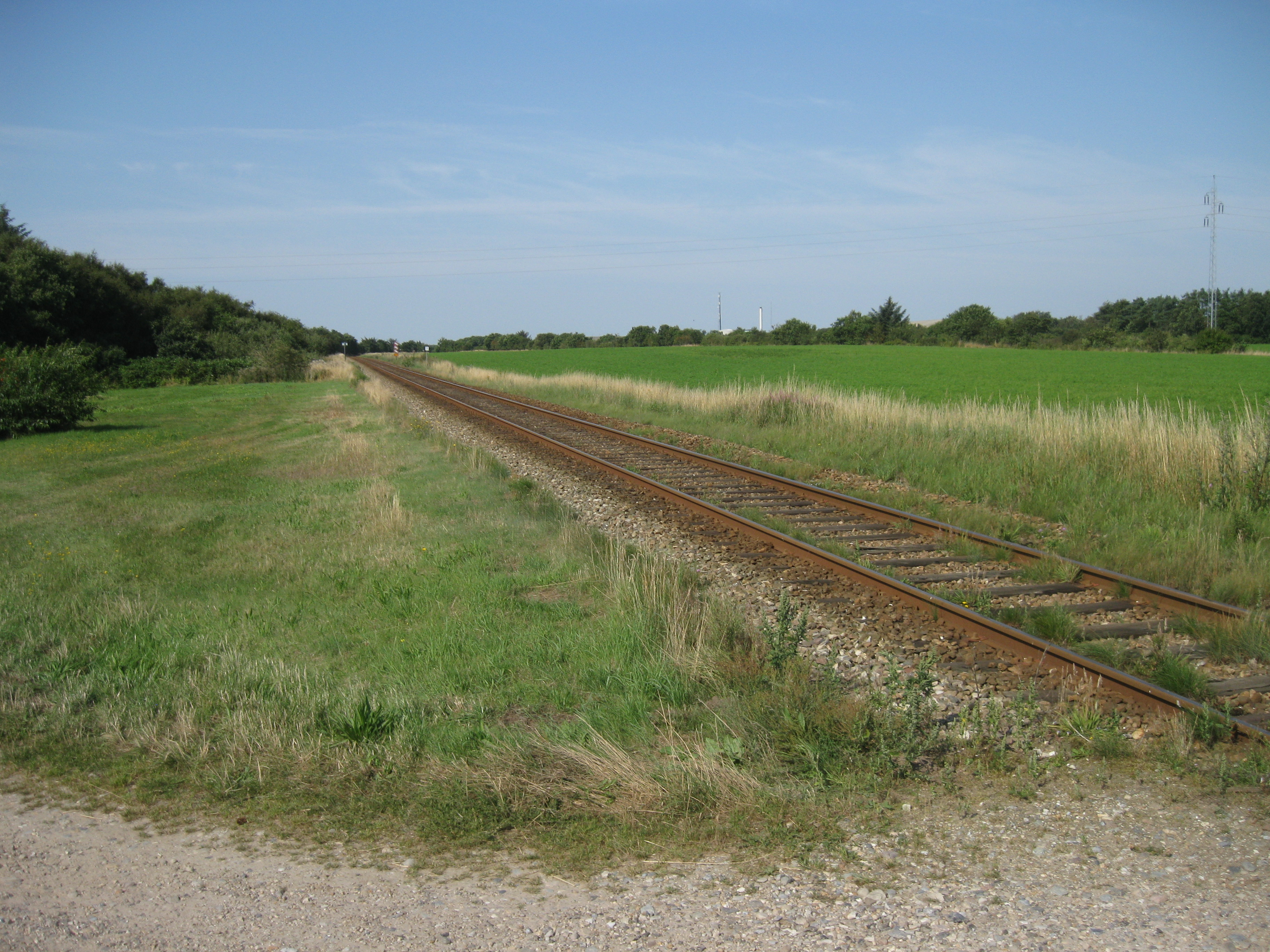 Det nedlagte trinbræt Hesselmed på Vestbanen